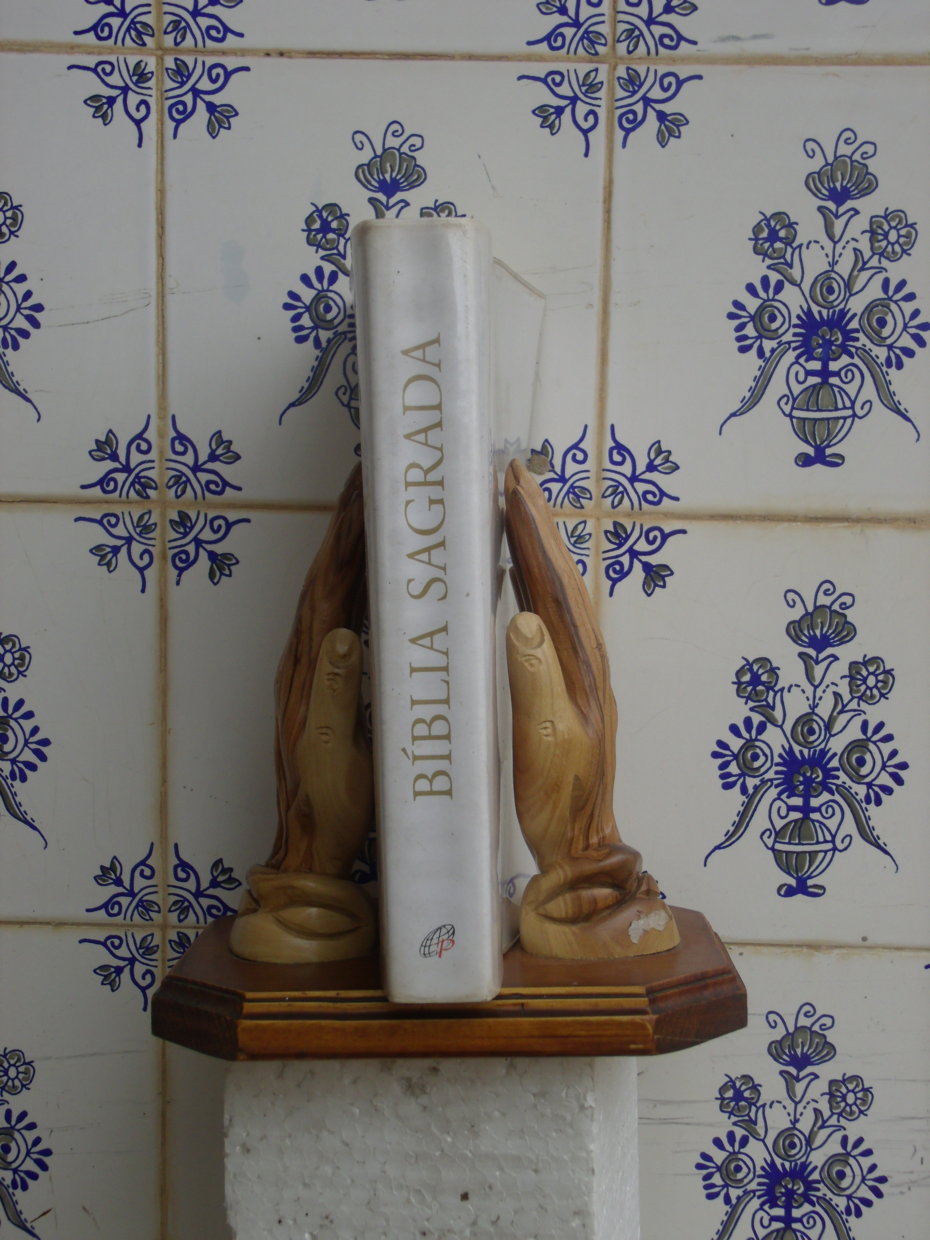 Bíblia em português de publicação da editora Paulinas.